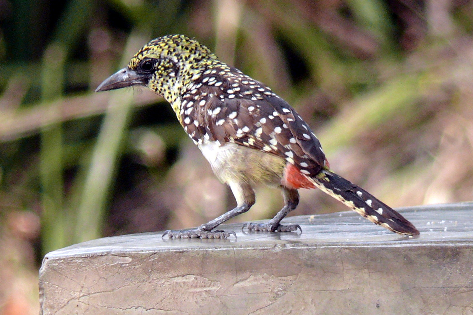 Ohrfleck-Bartvogel (Trachyphonus darnaudii)